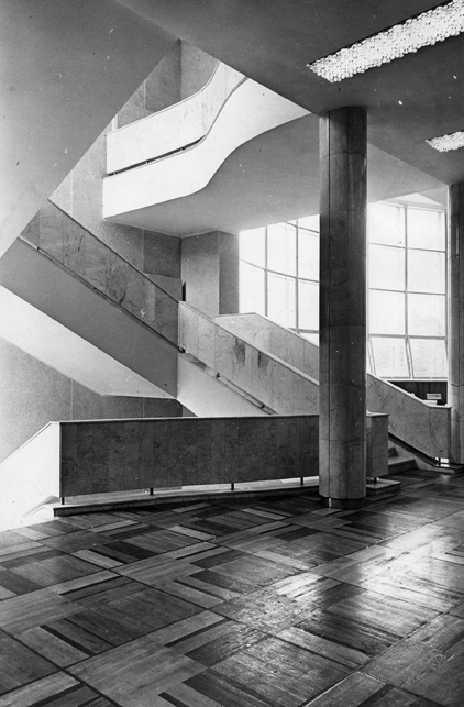 Фойе ДК ЗИЛа после реставрации